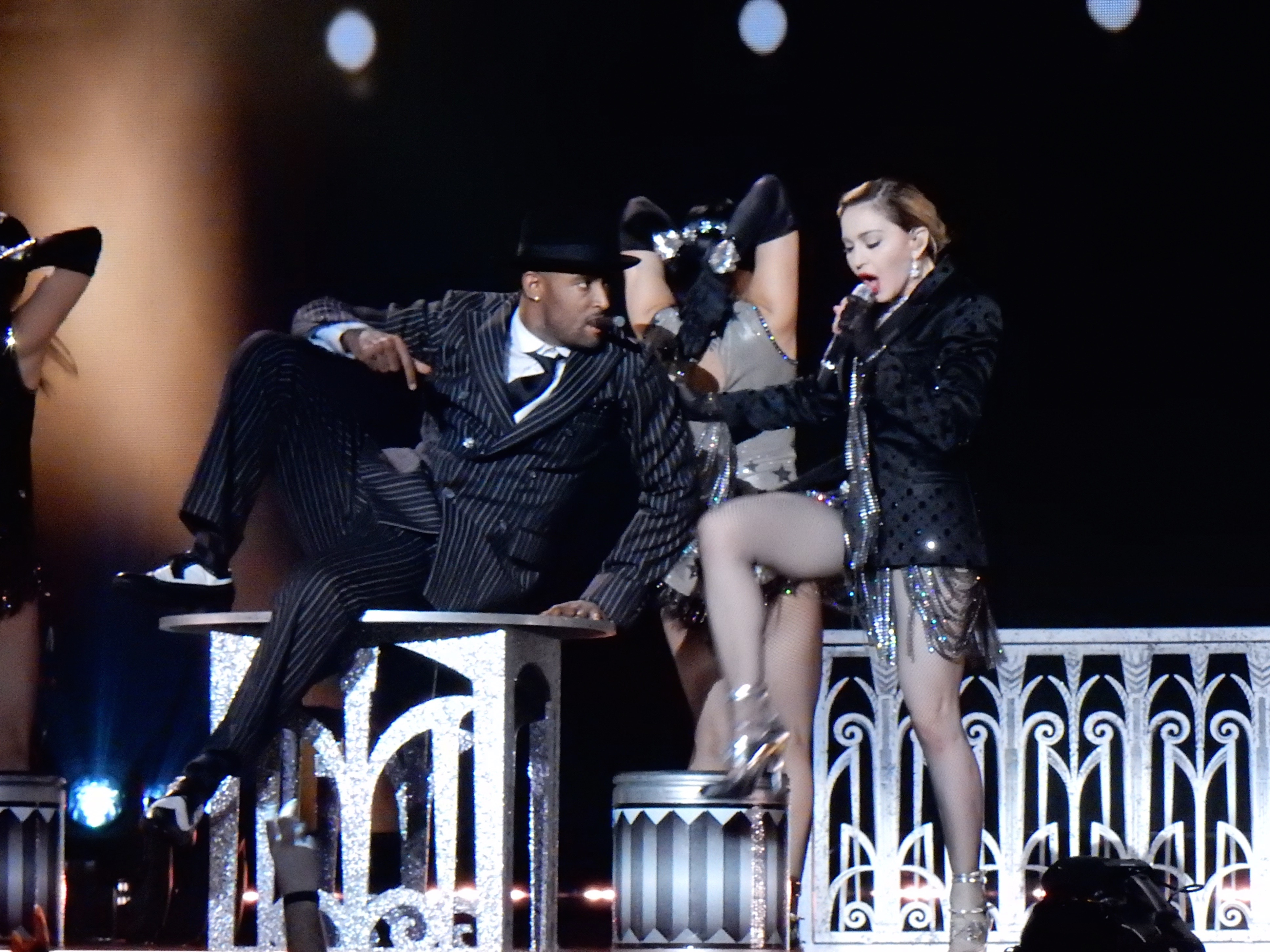 Madonna - Rebel Heart Tour Cologne 2